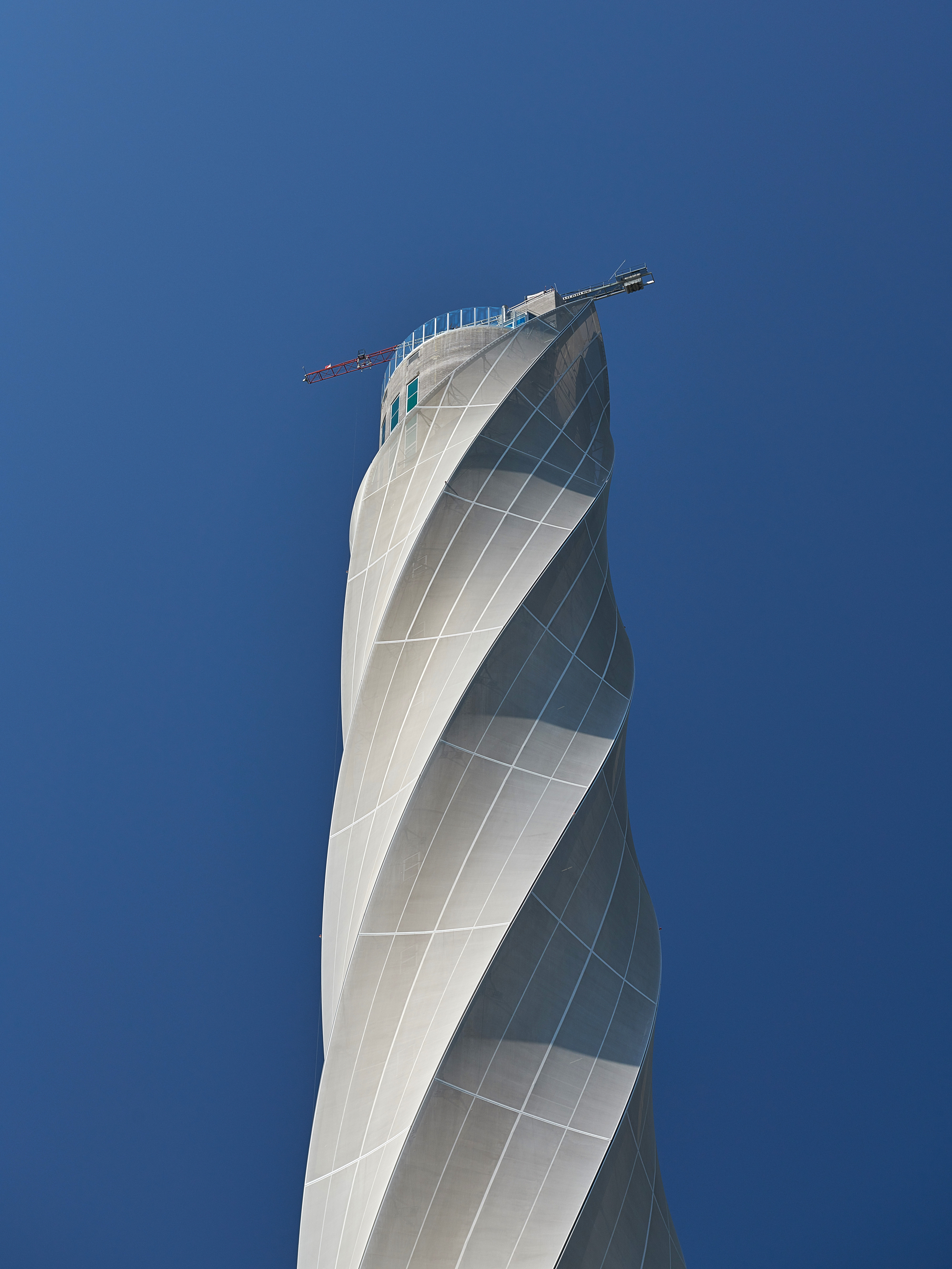 Thyssenkrupp Aufzugstestturm